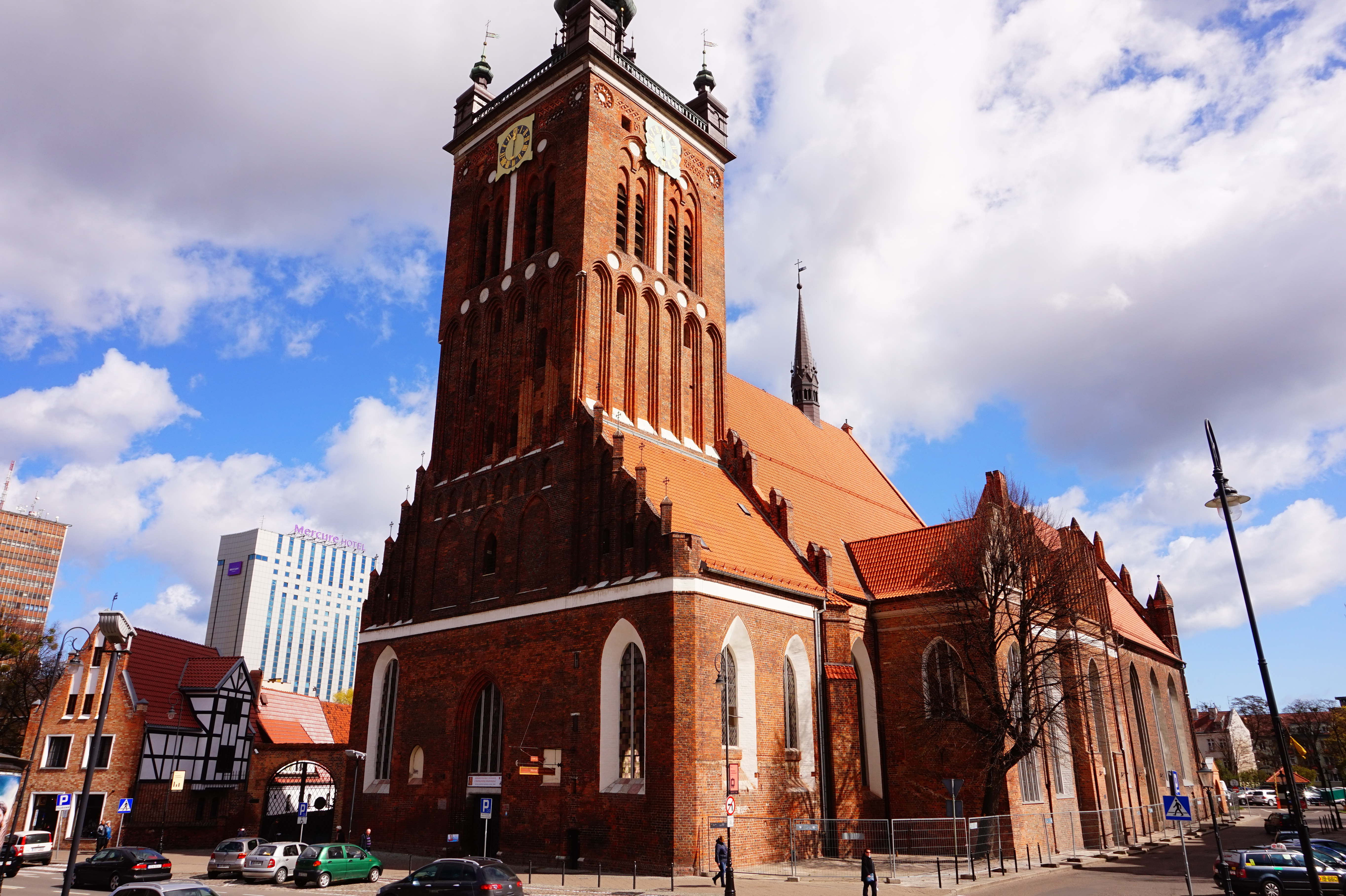 Gdańsk. Kościół Św. Katarzyny